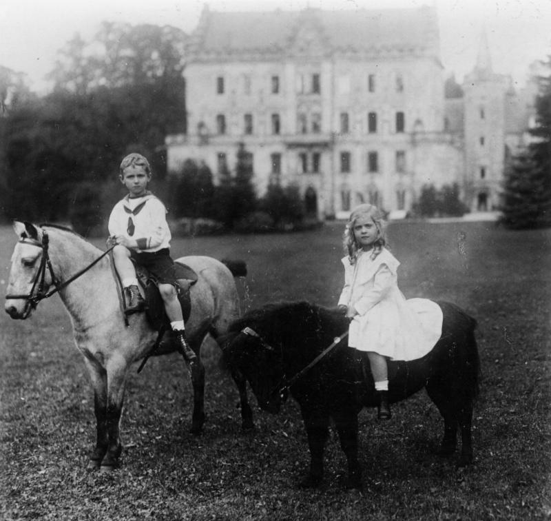 Erbprinz von Sachsen-Coburg und Gotha Scherl: Erbprinz Johann Leopold u. s. älteste Schwester Prinzessin Sybille im Park des Schlosses Reinhardsbrunn. ADN-ZB/Archiv: Johann Leopold, Erbprinz von Sachsen-Coburg-Gotha, geb. 2.8.1906 Schloß Callenberg bei Coburg, und seine älteste Schwester Prinzessin Sibylle (geb. 18.1.1908 Gotha) im Park des Schlosses Reinhardtsbrunn. Der Vater ist Leopold Karl Eduard Herzog von Sachsen-Coburg und Gotha. Aufn.: 1913 Abgebildete Personen: Sachsen-Coburg und Gotha, Karl-Eduard von: 1884-1954, Herzog, Präsident des Deutschen Roten Kreuzes, Deutschland